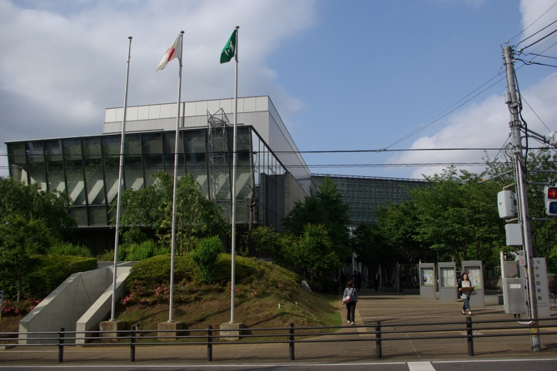 千葉市中央図書館